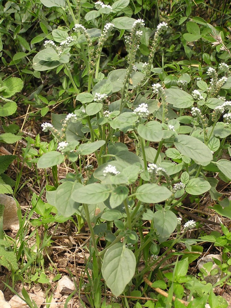 Heliotropium europaeum auf Sizilien.